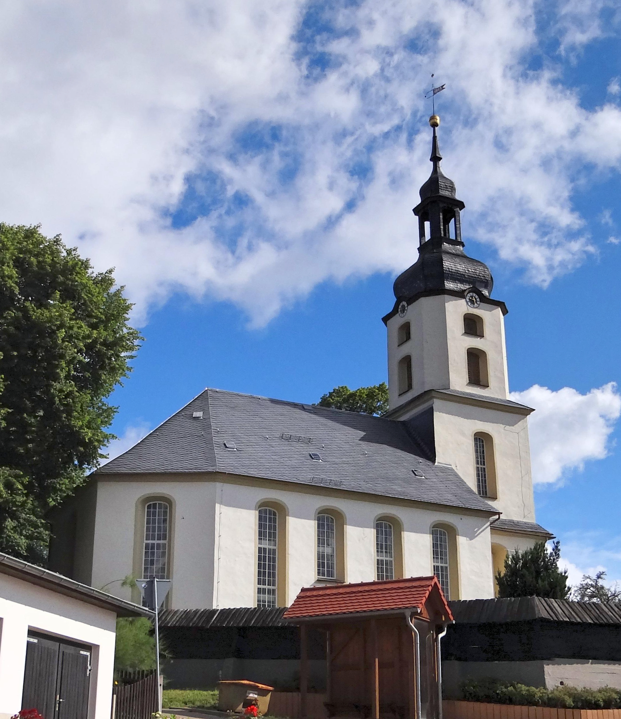 07937 Zadelsdorf, Germany